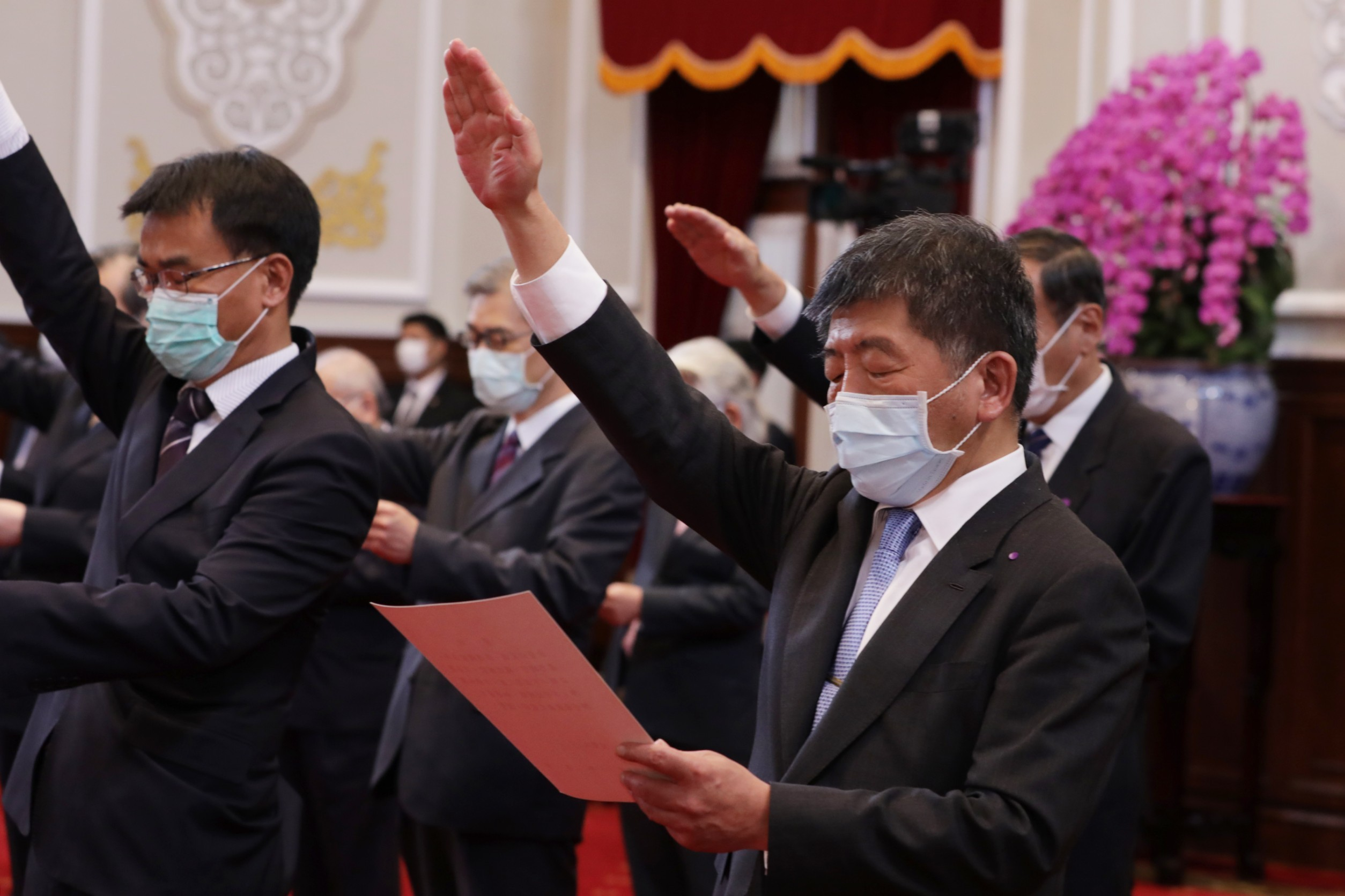 中文（台灣）: 行政院副院長暨各部會首長宣誓典禮，衛生福利部部長陳時中宣誓。